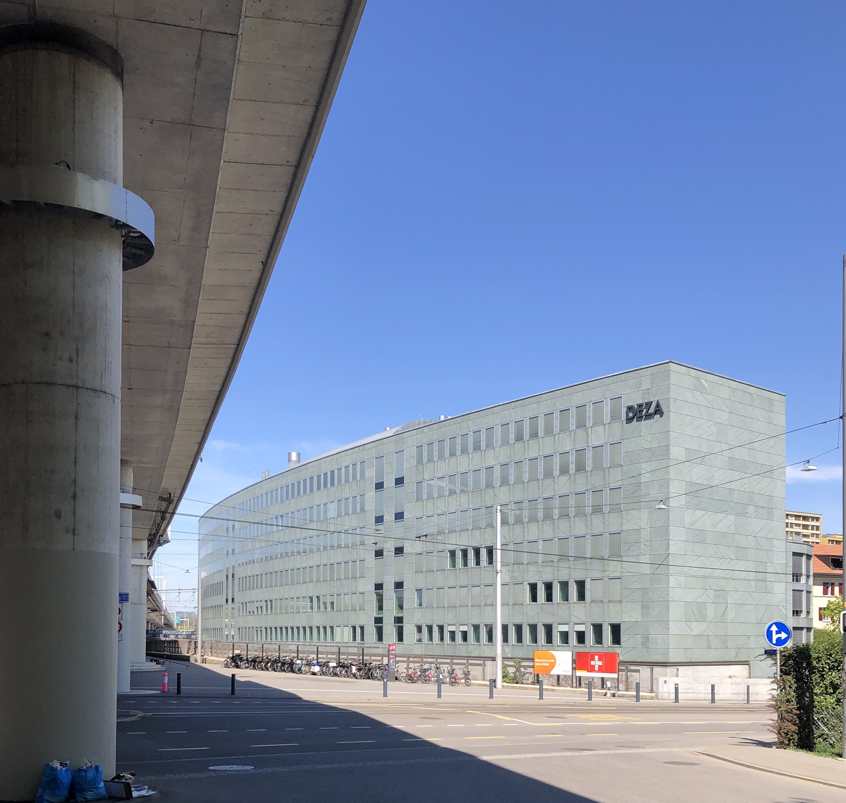 Gebäude DEZA